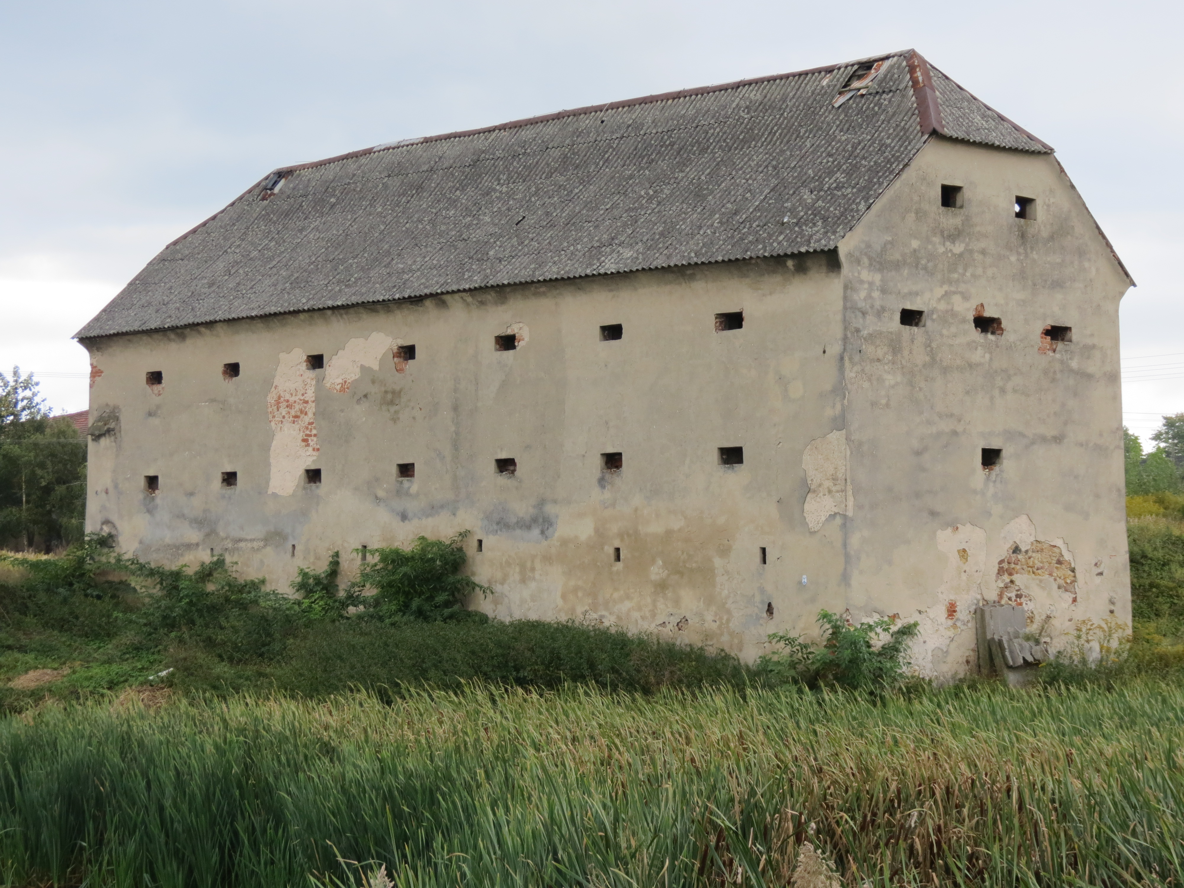 Ziemięcice - spichlerz z XVIII w., murowany (zabytek nr A/132/09)